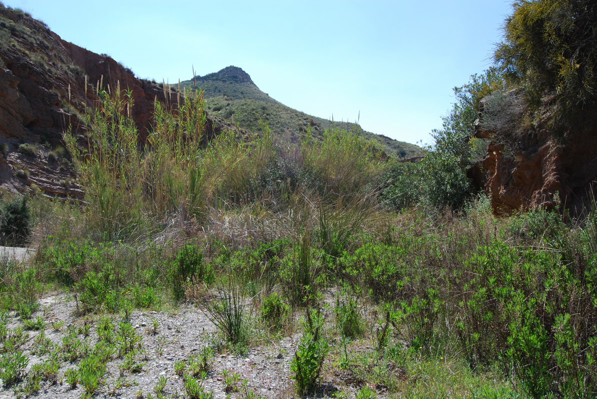 Bosque de galería en el interior de la Rambla de Vilerda